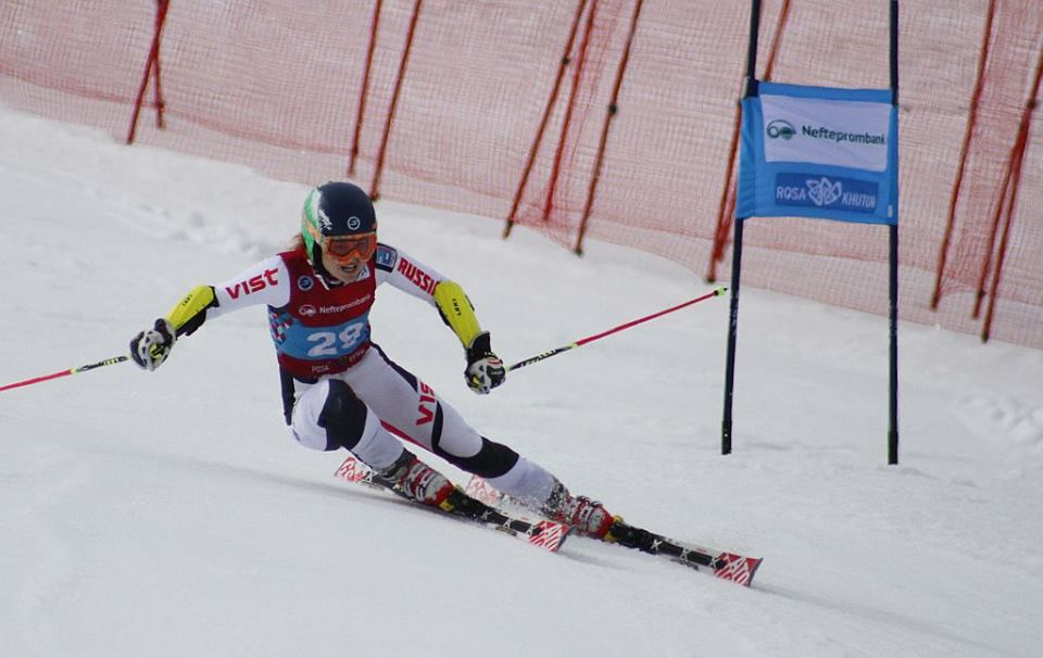 Первенство Мира среди юниоров, Сочи 2016